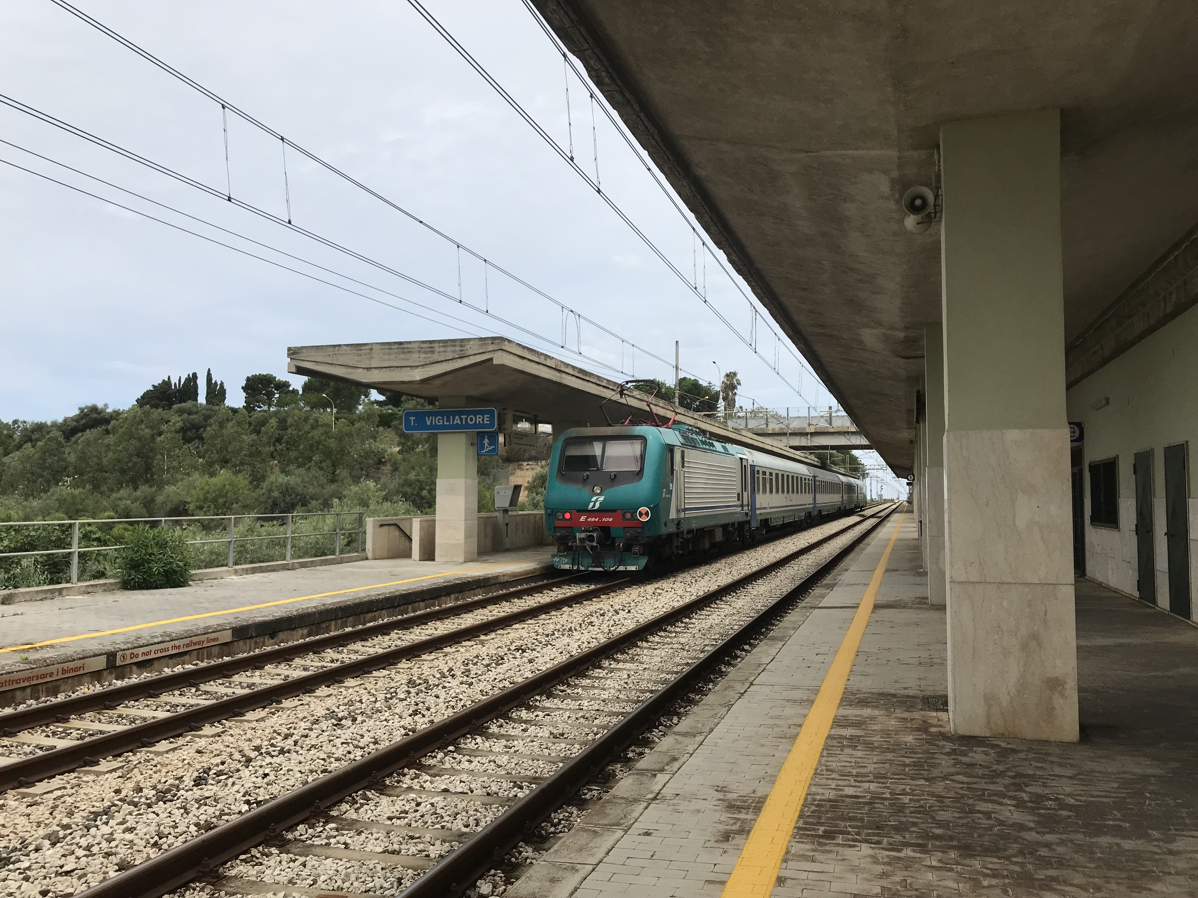 Haltepunkt Terme Vigliatore